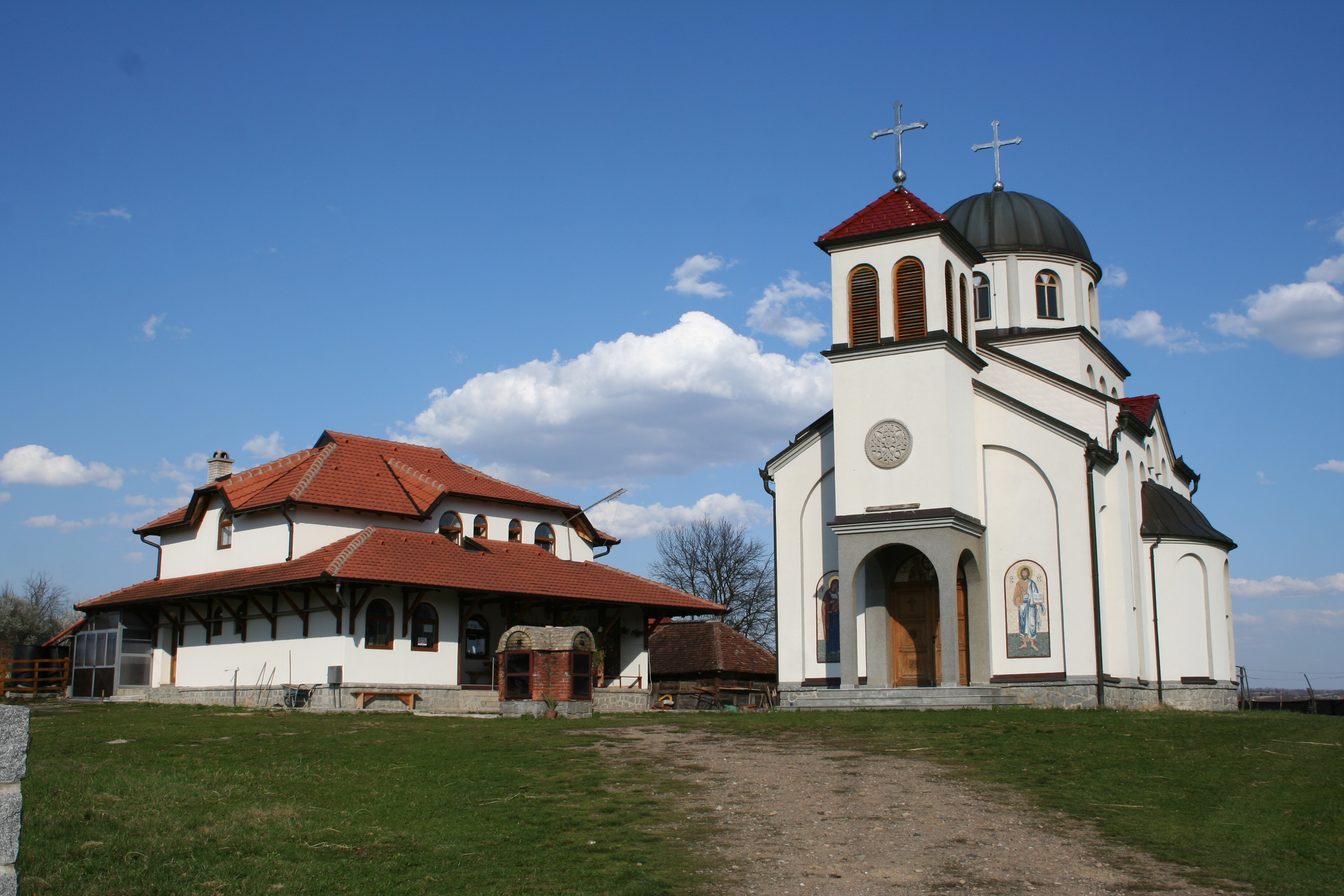 Manastir Plužac